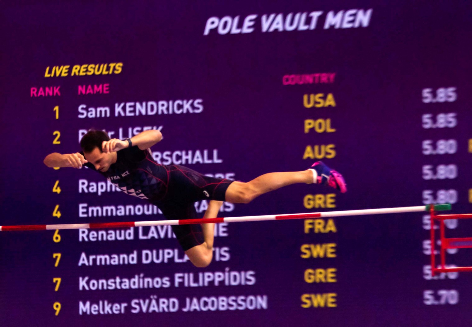 WK040388 polsstok lavillenie